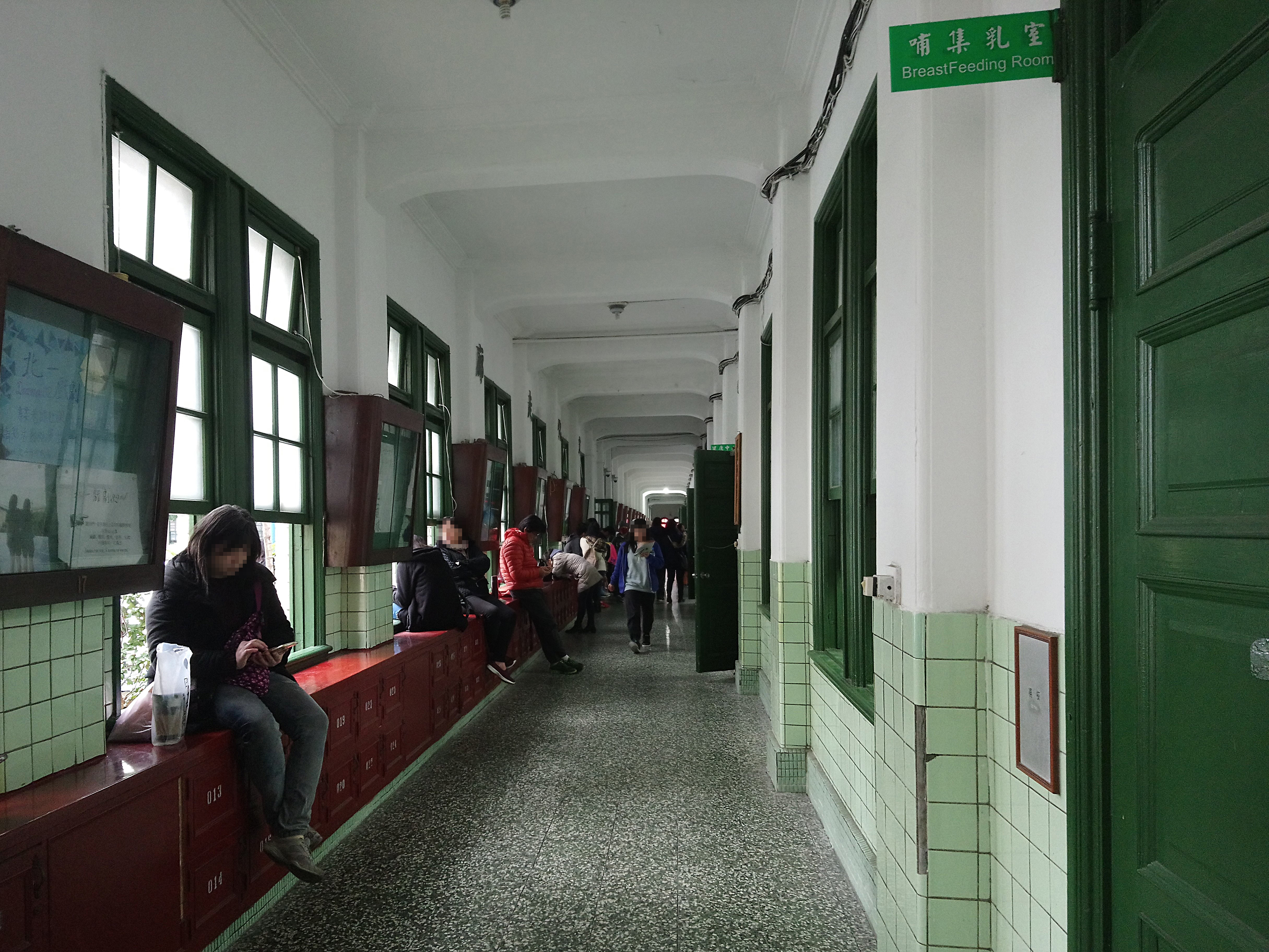 臺北市立第一女子高級中學光復樓走廊,臺北市中正區城內次分區建國里